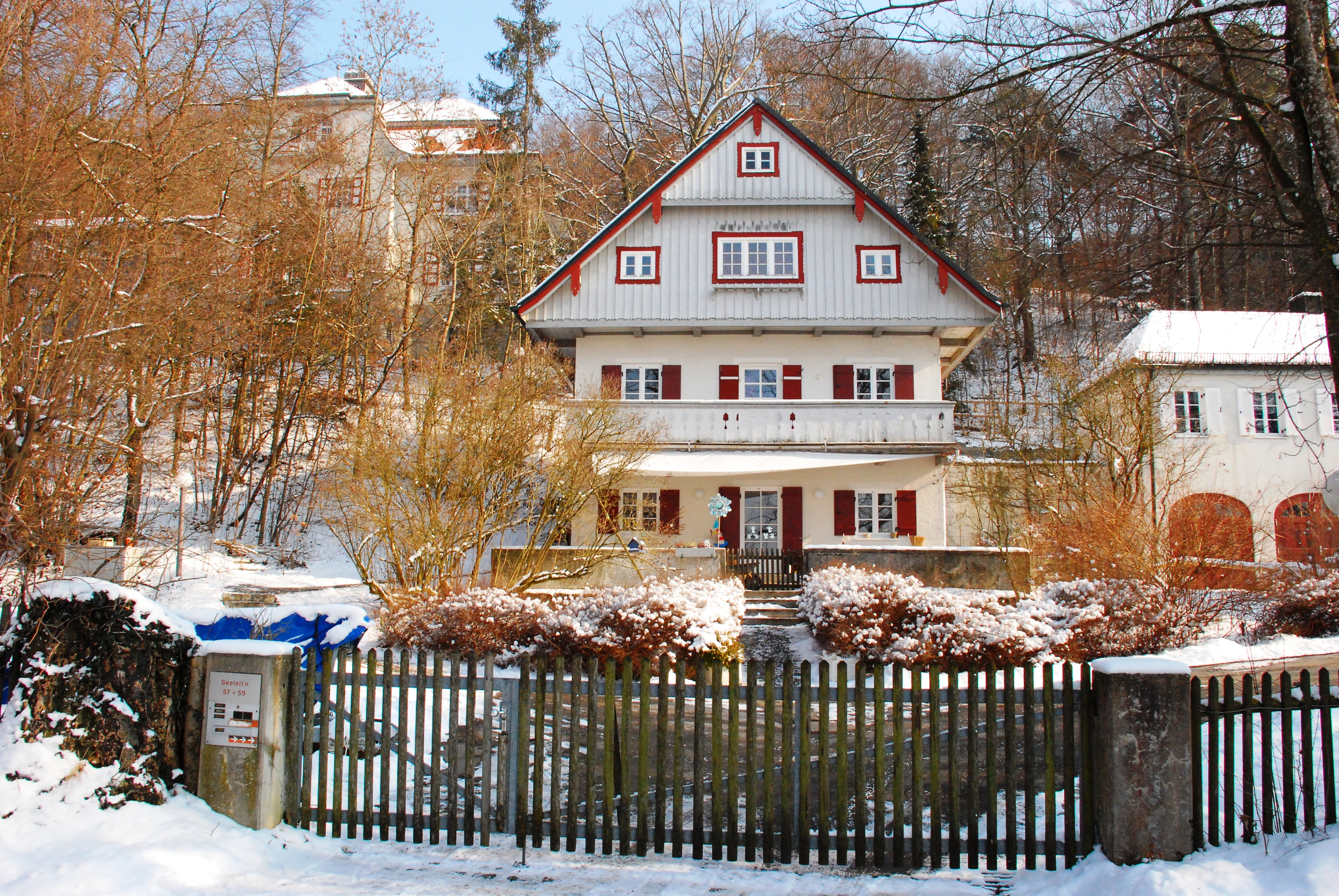 Landschulheim der Landeshauptstadt München an der Seeleiten 57 in Seeheim, Gemeinde Münsing, Landkreis Bad Tölz-Wolfratshausen, Regierungsbezirk Oberbayern, Bayern. Als Baudenkmal in der Bayerischen Denkmalliste aufgeführt.